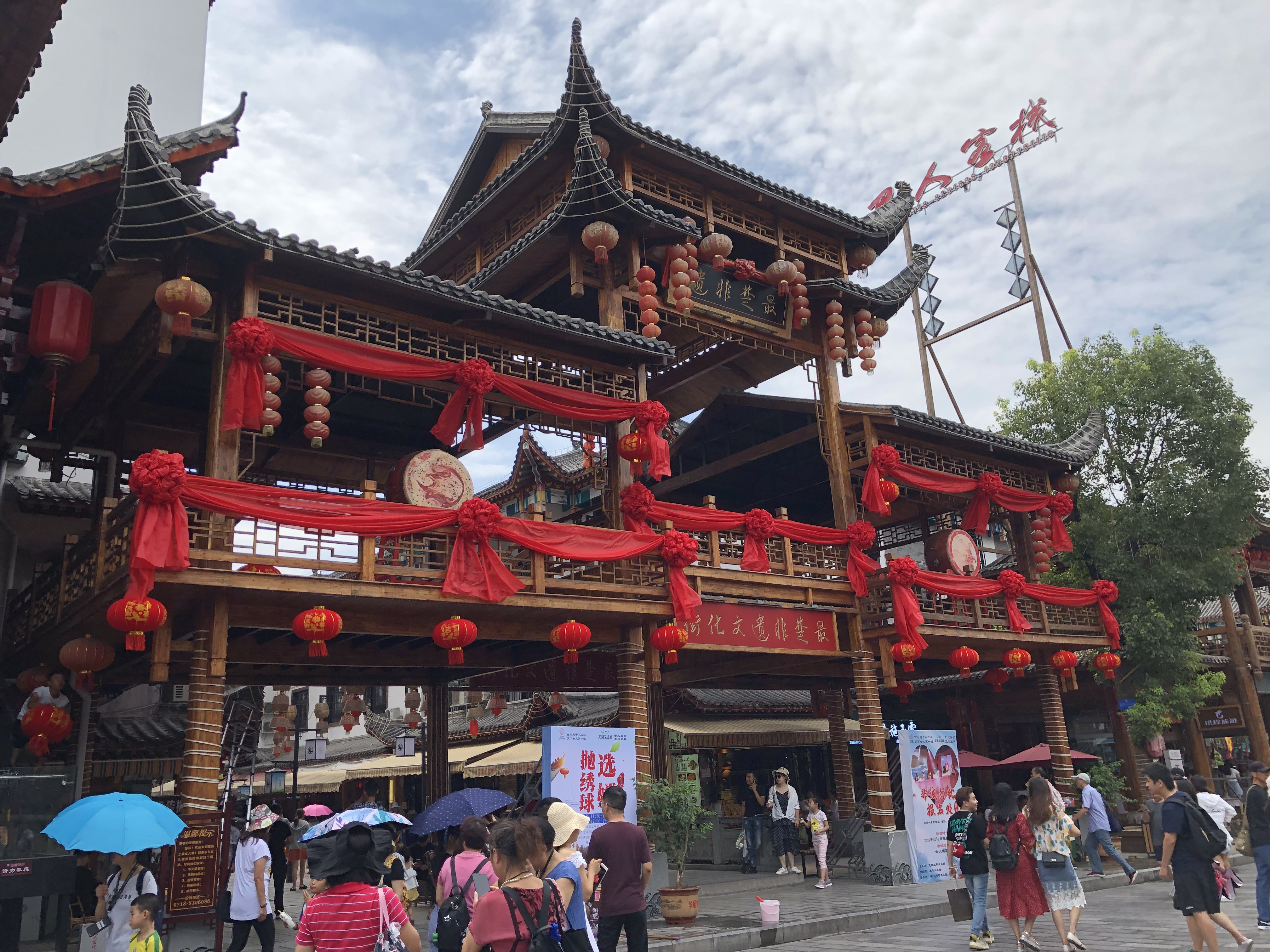 中文（中国大陆）: 恩施土家女儿城